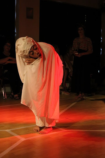 שבע בום